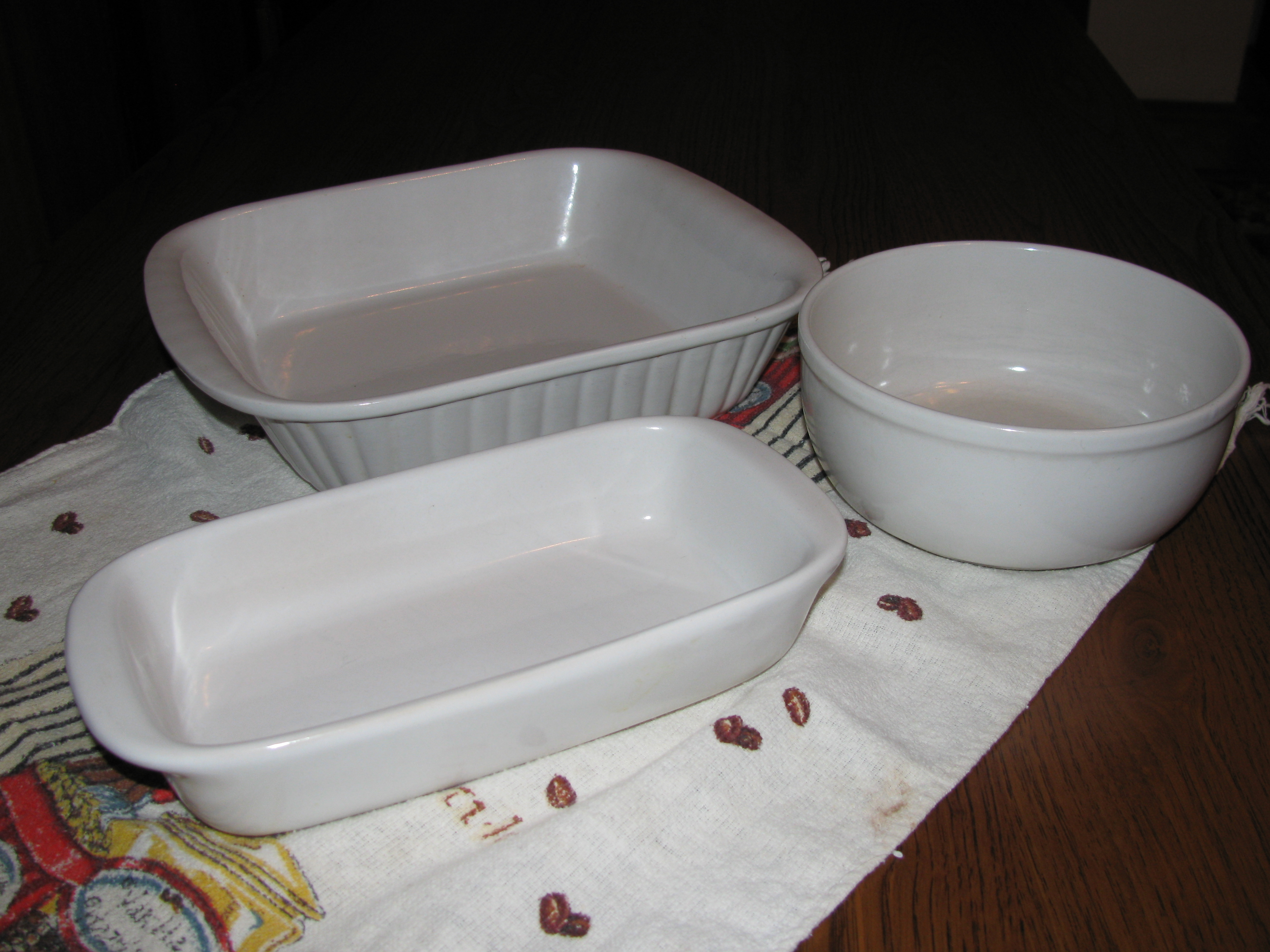 Керамічний посуд для випікання